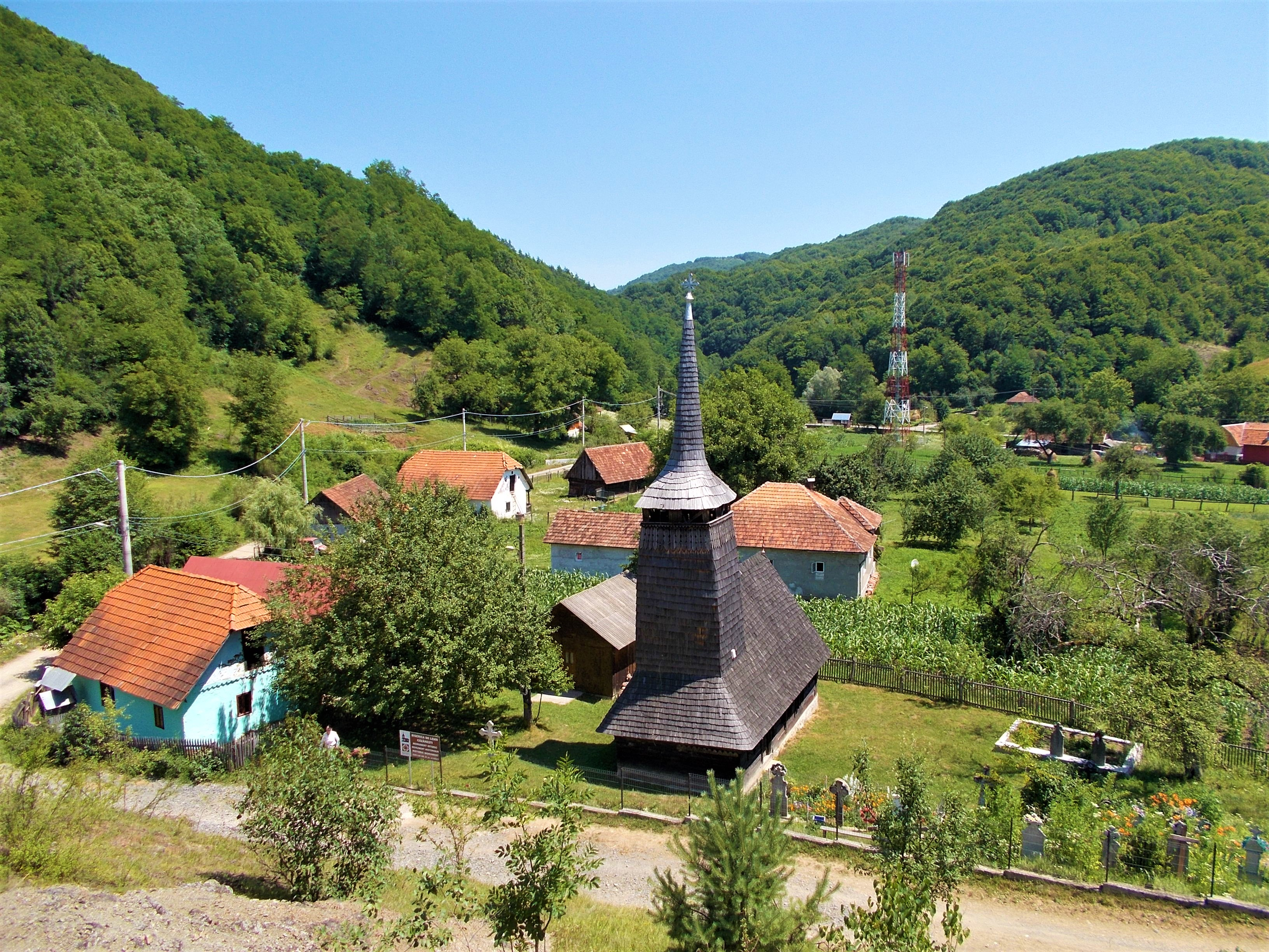 Biserica de lemn din satul Căzănești, comuna Vața de Jos, județul Hunedoara